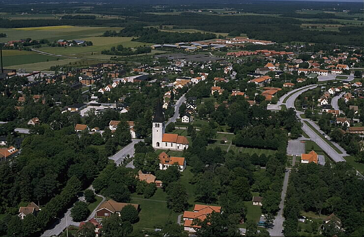 Hemse kyrka i bildens mitt. Motiv: Hemse Nyckelord: Flygbilder, Riksintressen Kategori: Miljöer, Tätort Hemse kyrka i bildens mitt. Länsväg 142 går förbi precis väster om kyrkan.